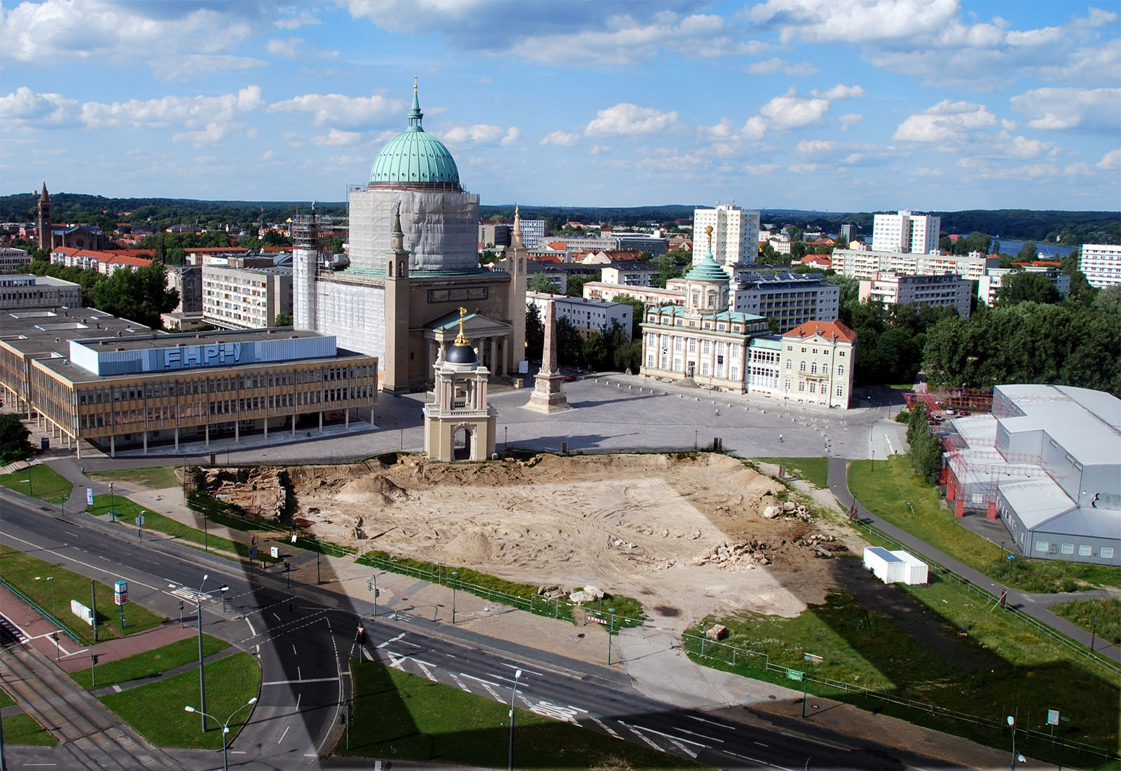 Blick über den Alten Markt in Potsdam. Dunkel hervorgehoben ist im Vordergrund der Grundriss des Stadtschlosses.